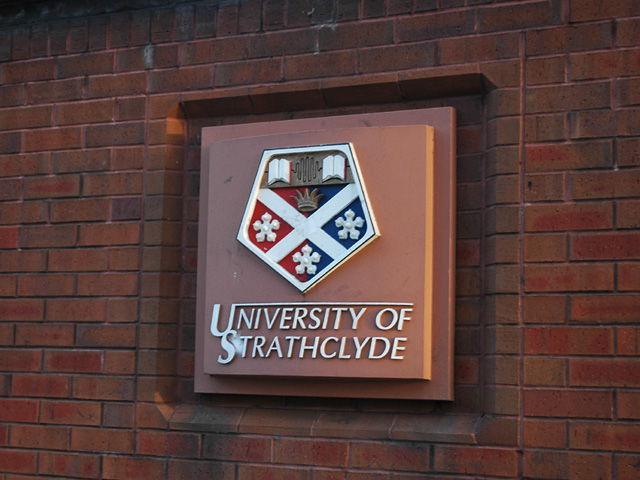 史崔克萊大學校徽 史崔克萊大學是一所歷史最早可以回溯到18世紀時的蘇格蘭大學，位於工商大城格拉斯哥境內。 本照片是由上傳者User:SElephant本人拍攝於2004年8月間。